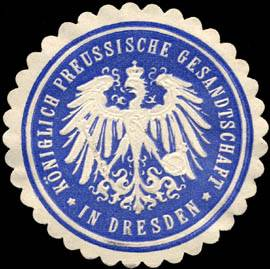 Sealing stamp Title: Königlich Preussische Gesandtschaft in Dresden Description: blau, weiß, geprägt Place: Dresden size: 4 cm